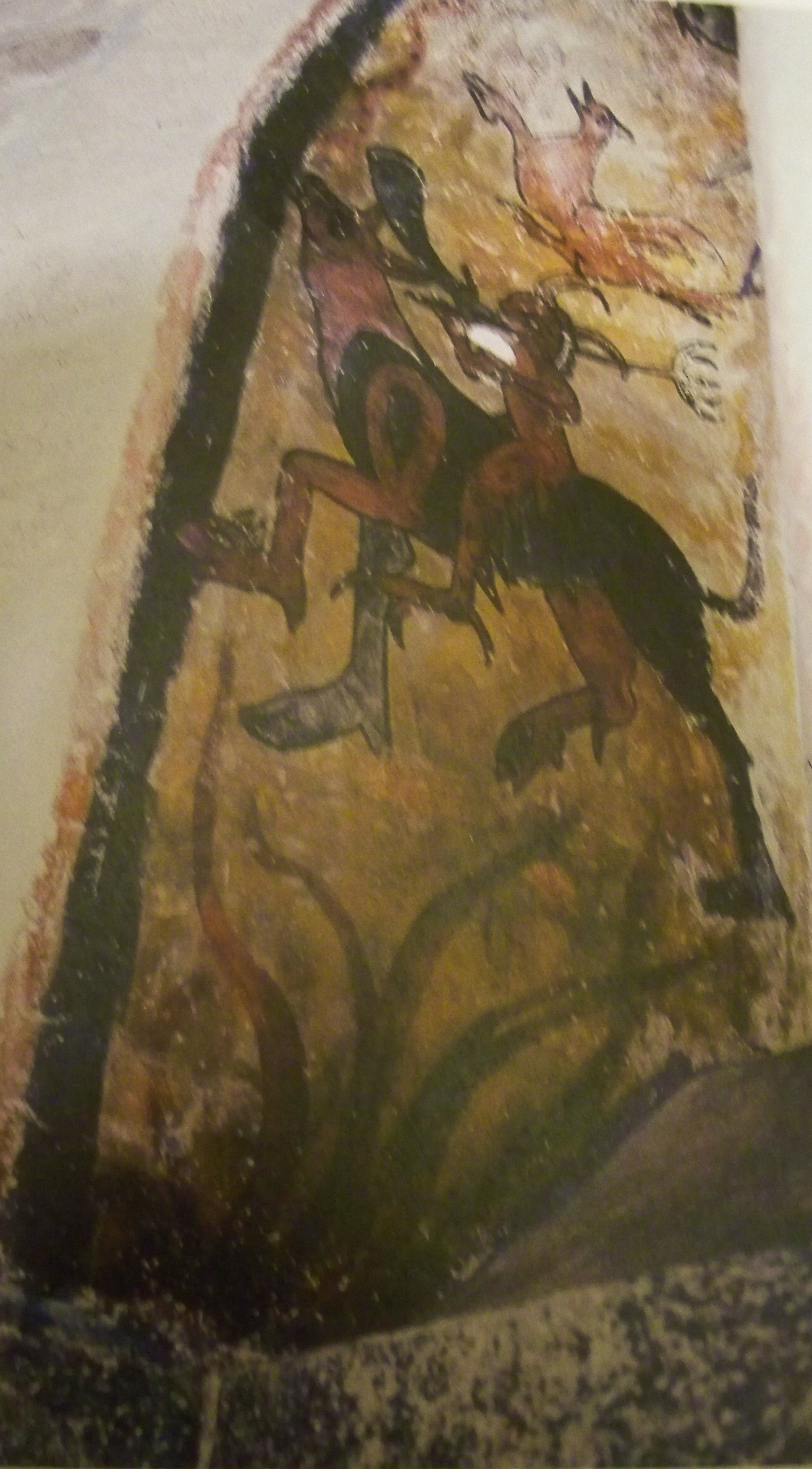 Fresque à la Chapelle Saint Sixte d'Aubignan, Vaucluse, France